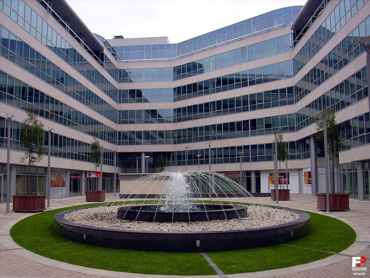 Dziedziniec z fontanną pomiędzy Rezydencją Tumską i biurowcem Bema Plaza.